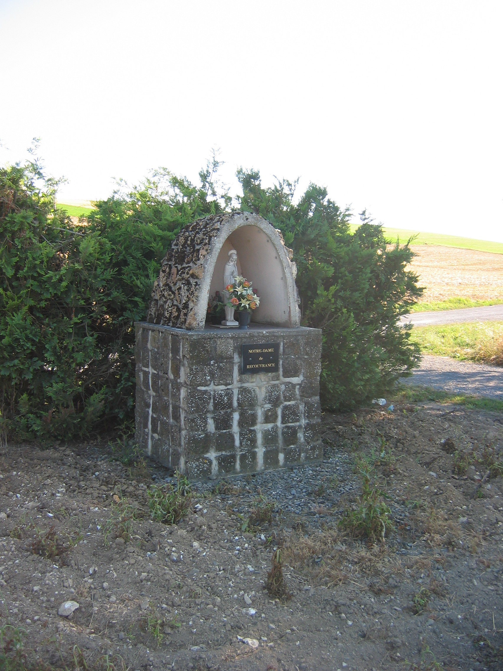 Chapelle Recouvrance Banogne-Recouvrance Ardennes France